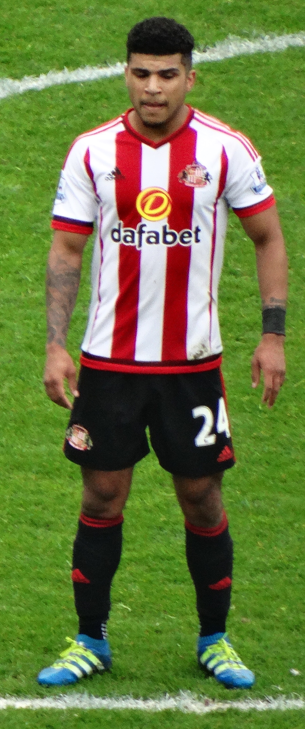 Sunderland 3 Chelsea2